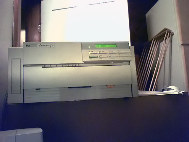 HP LaserJet 4P